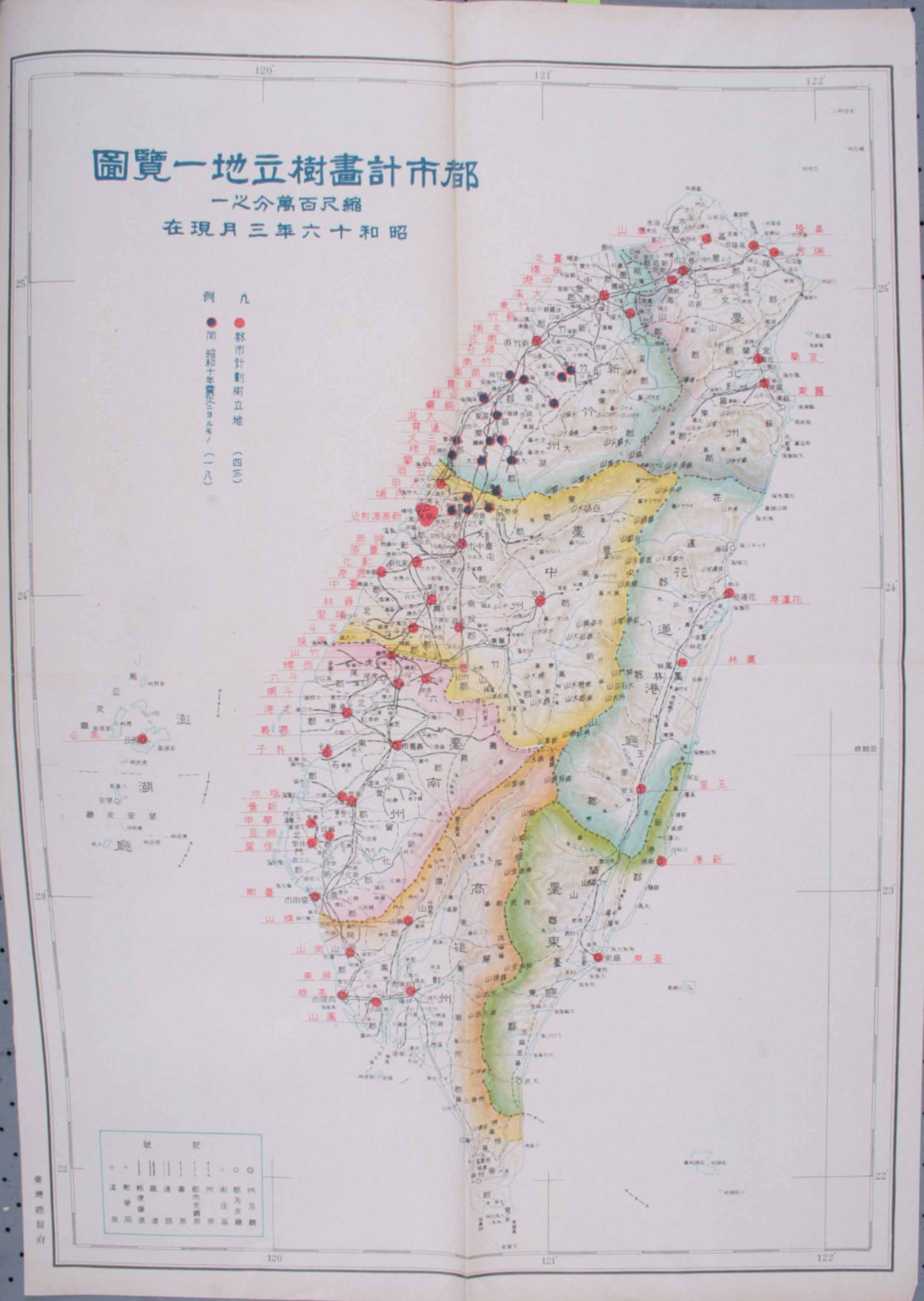 台灣日治時期都市計畫設立的分布圖